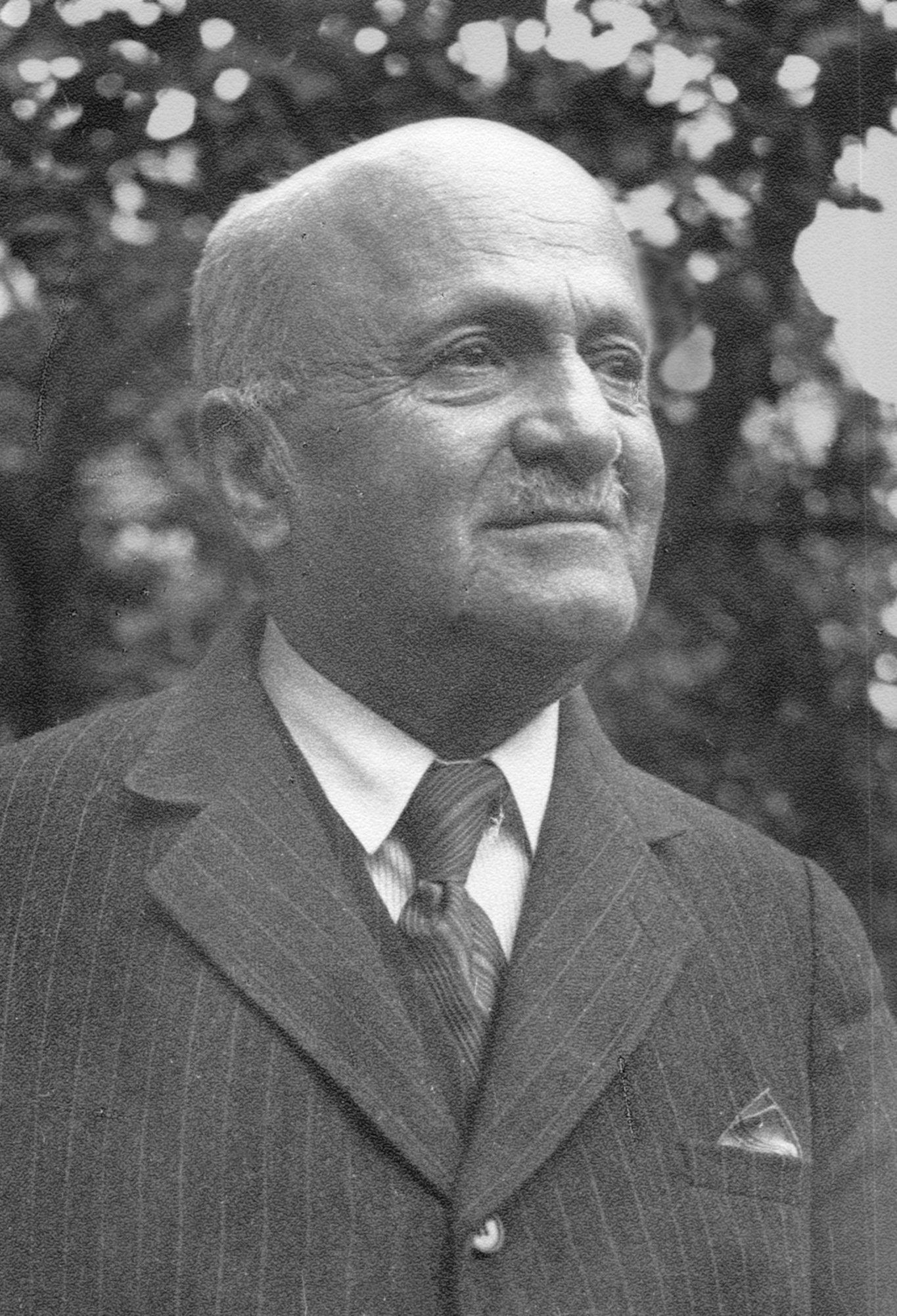 Anton Norst (aufgenommen in Lemberg 1937)